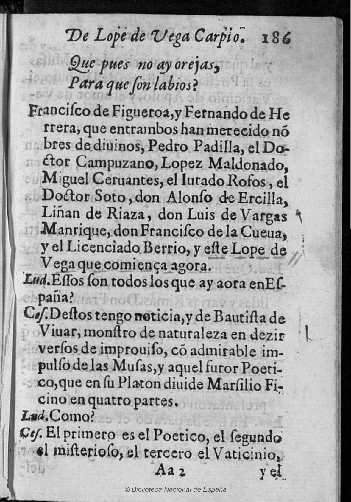 La Dorotea de Lope de Vega, 1632; página 186, en la que aparece nombrado Juan Bautista de Vivar.